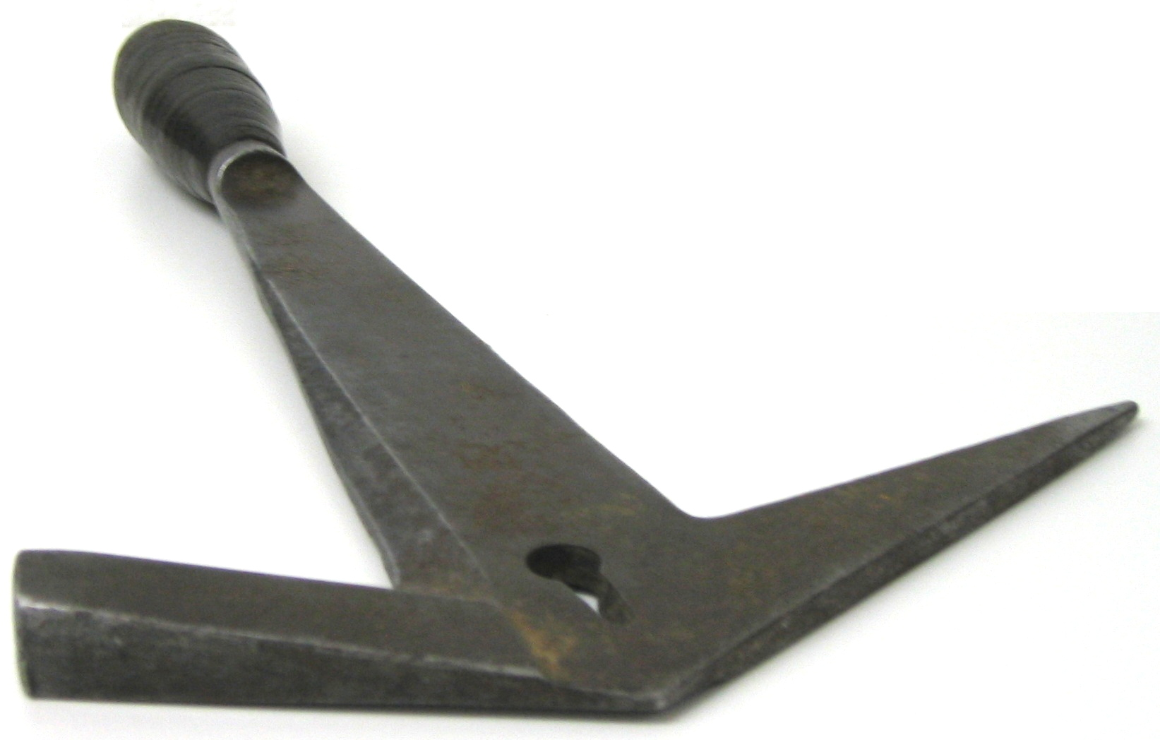 Schieferhammer (Werkzeug des Dachdeckers)